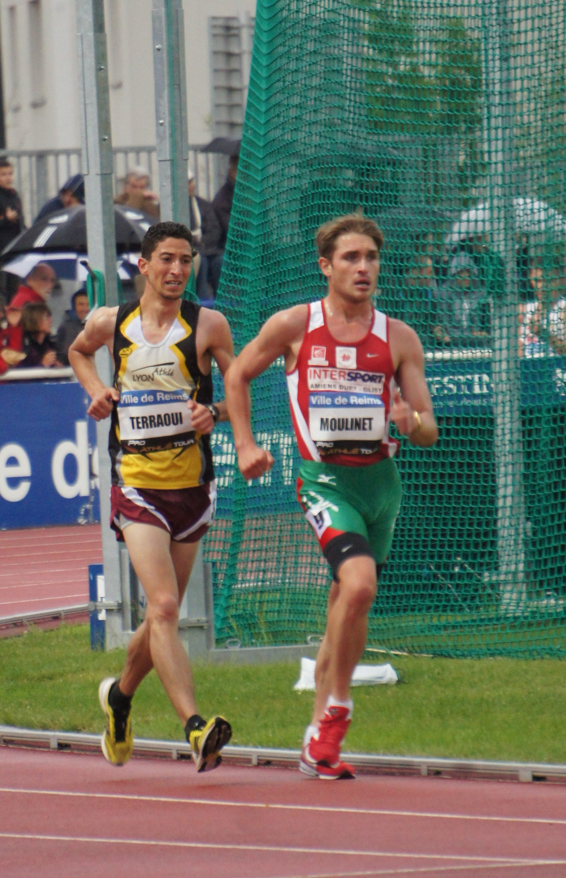 Hédi Taraaoui et Bertrand Moulinet lors des Rencontres d'athlétisme de Reims 2013.